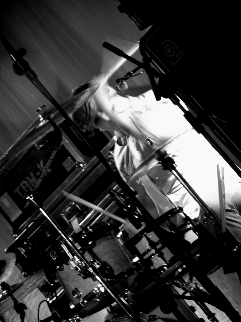 Brandon Saller, drummer of Atreyu, performing live.